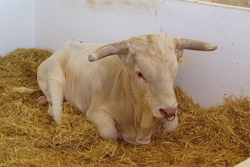 Ejemplar de raza blanca cacereña en la Feria Internacional Ganadera de Zafra, España.